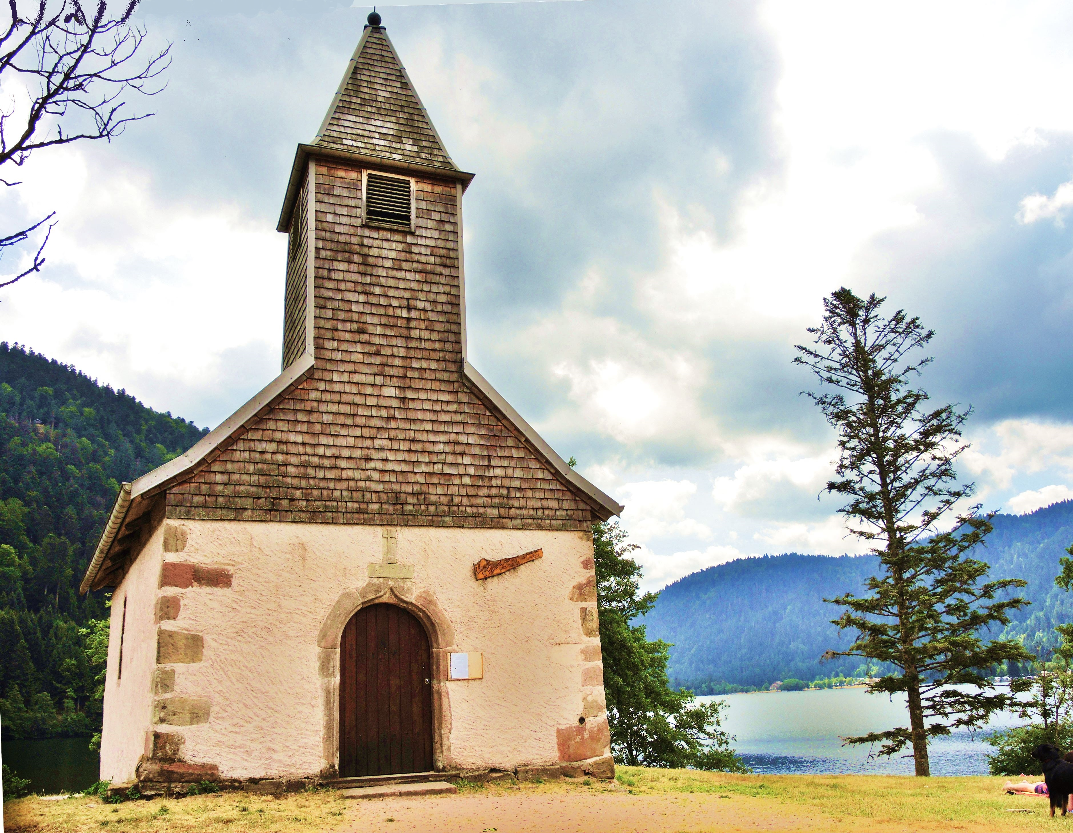 Chapelle saint Florent. Datée de 1727.